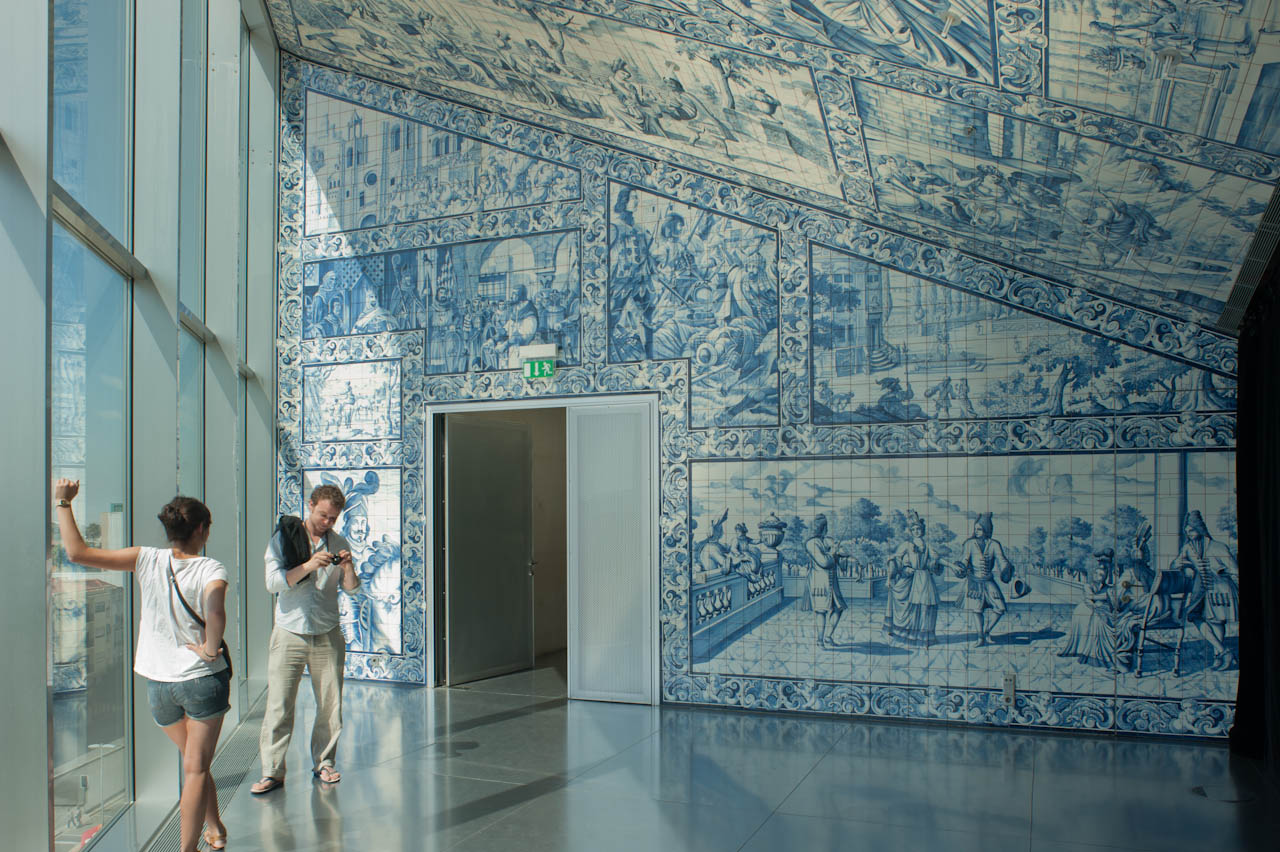 Casa Das Musica Porto Portugal Rem Koolhaas 2005 2011-08-19